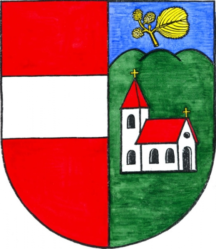 znak, Olešnice v Orlických horách, okres Rychnov nad Kněžnou